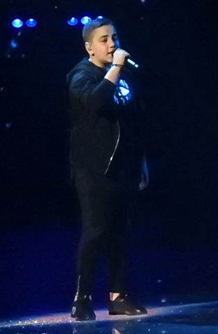 Izraelski piosenkarz Noam Dadon podczas prób do występu w 16. Konkursie Piosenki Eurowizji dla Dzieci w Mińsku, 24 listopada 2018.